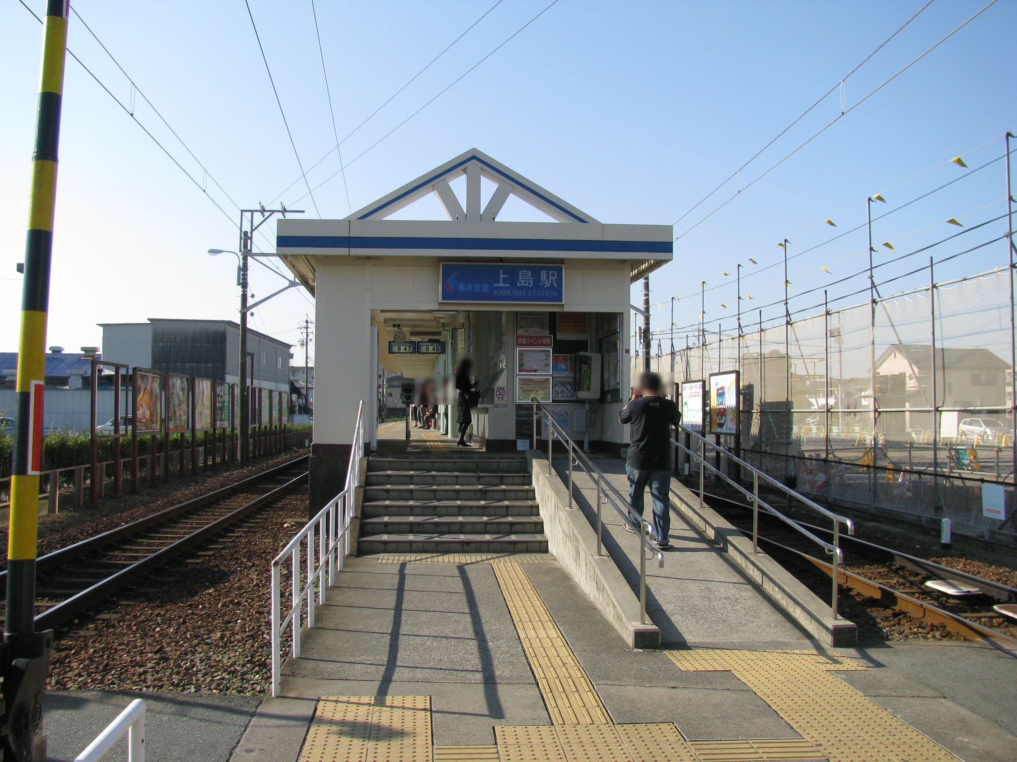 遠州鉄道上島駅